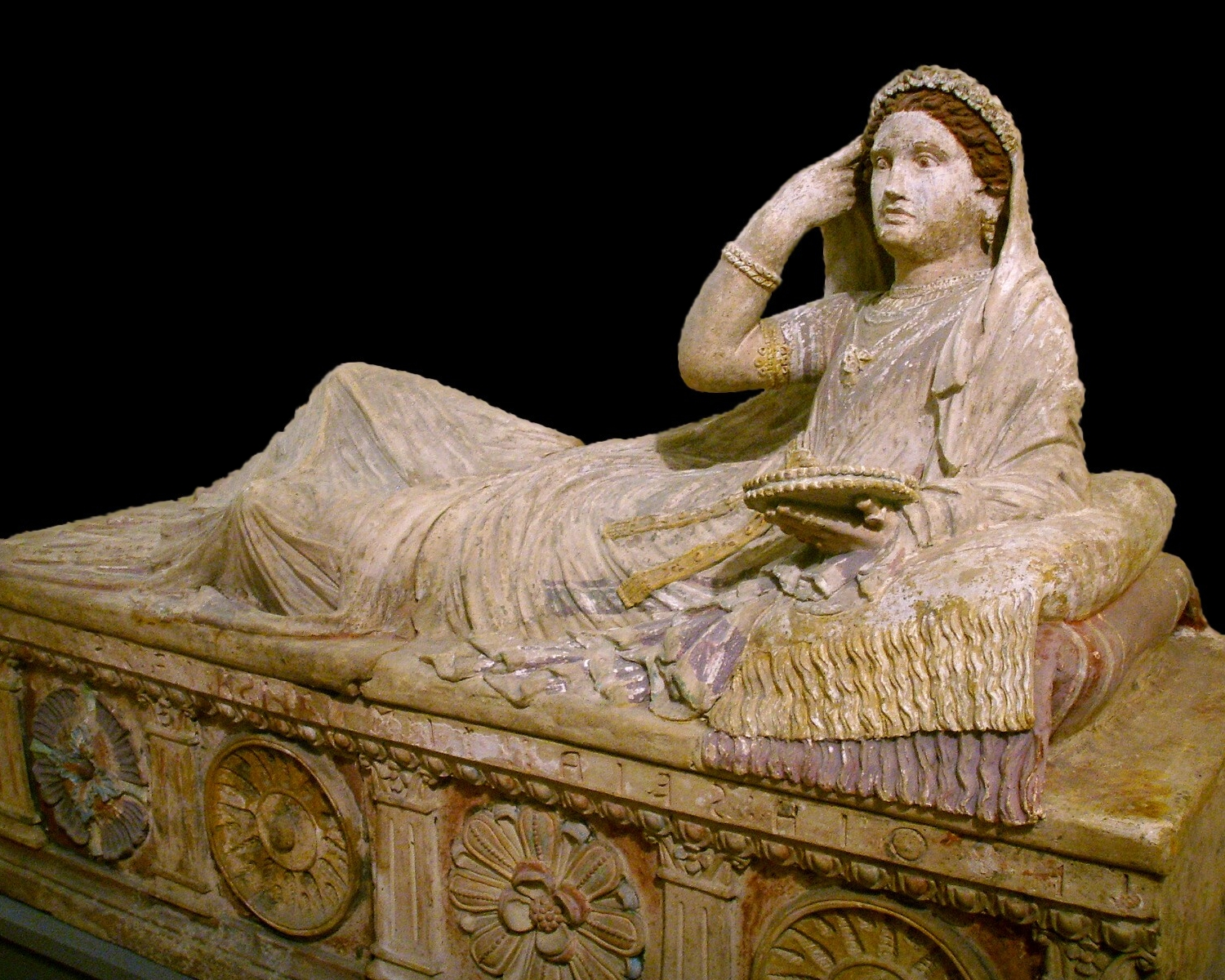 Sarcofago etrusco di Letitia Saeianti. Opera etrusca nel Museo archeologico di Firenze. museum in Florence